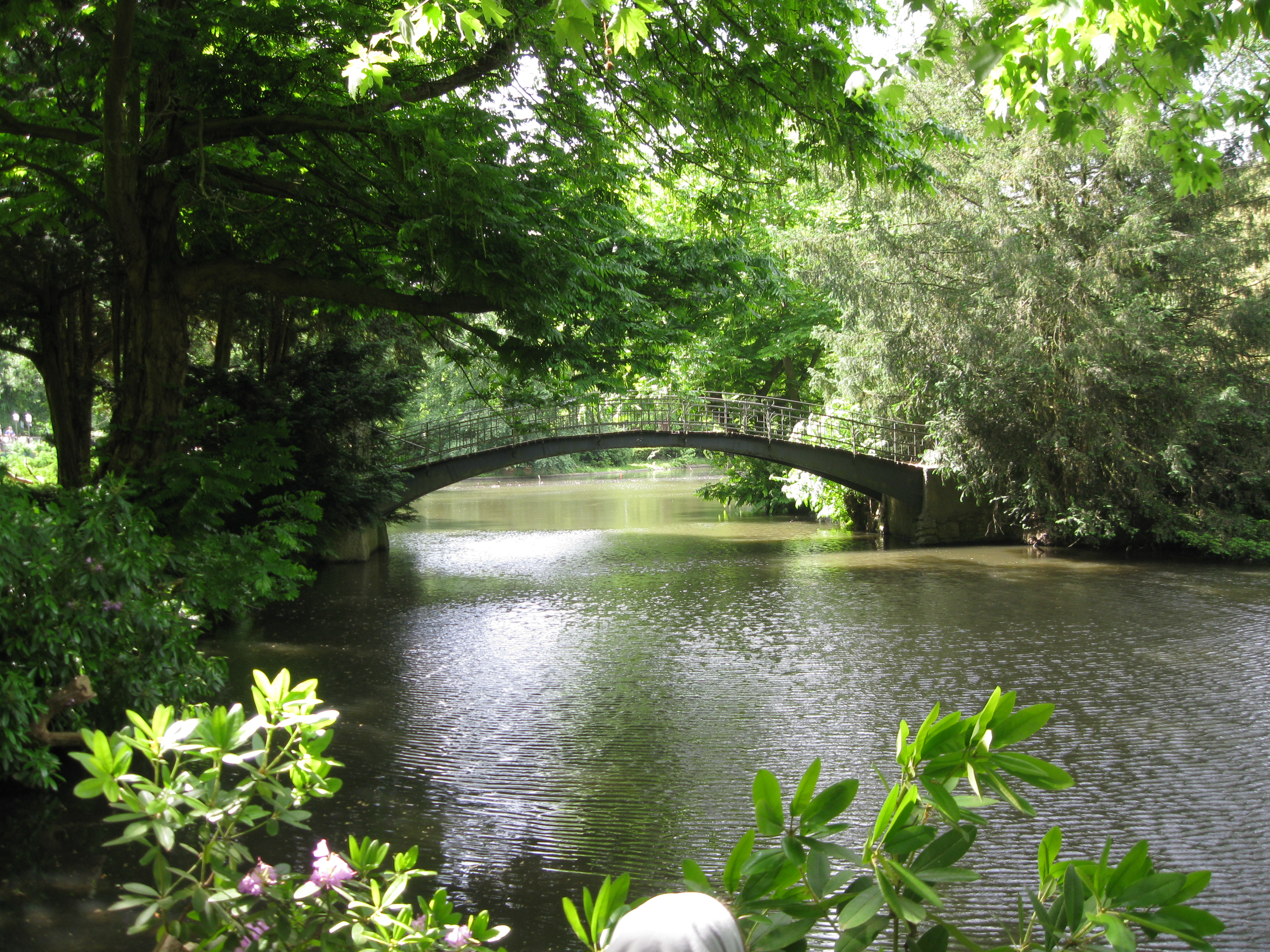 Mönchengladbach Volkspark Seebrücke